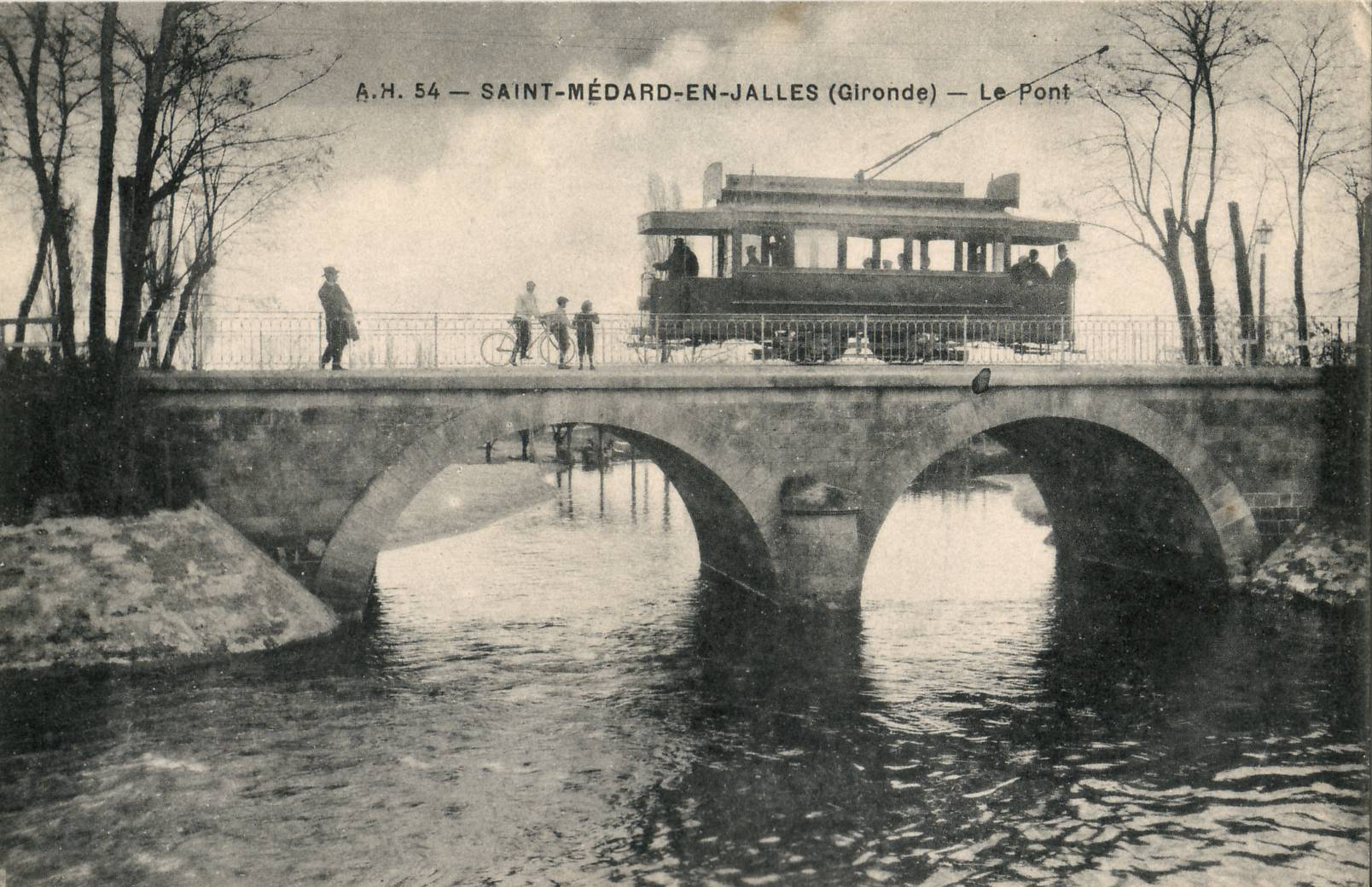 Carte postale ancienne éditée par A. H. n°54 :SAINT-MEDARD-EN-JALLES Le tram en provenance de Bordeaux franchit la Jalle à Gajac.